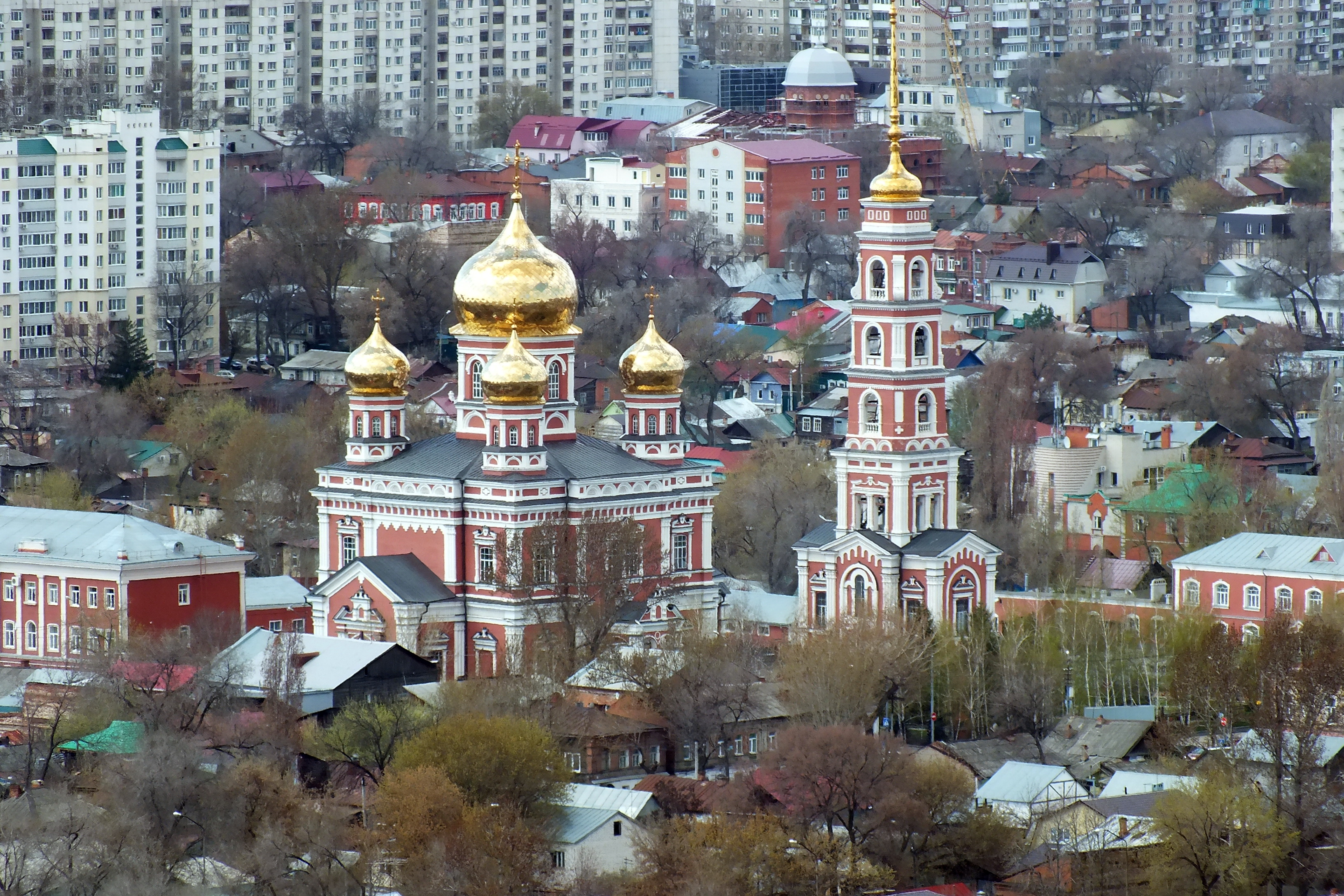 Вид на Покровскую церковь (улица Максима Горького, 85, Саратов, Саратовская область) с мемориального комплекса «Журавли»